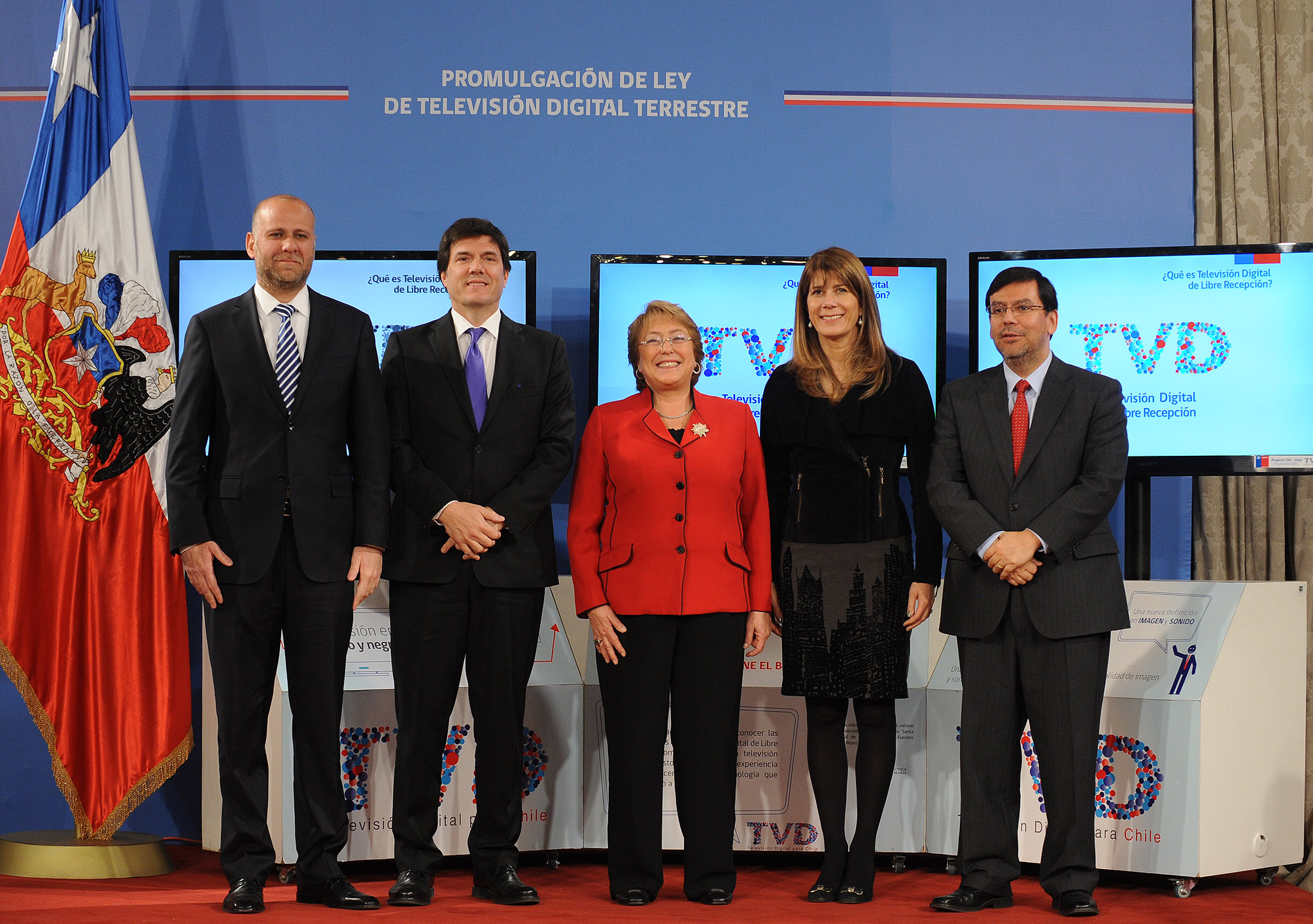 Presidenta promulga ley que permite introducción de TV Digital Terrestre al país